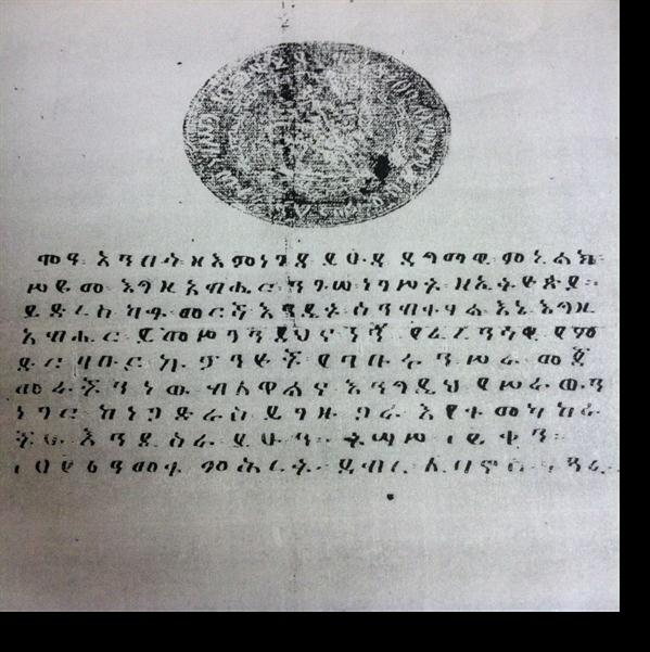 አማርኛ: ዓጼ ምኒልክ ለአቶ መርሻ የፃፉት ደብዳቤ (1909 እ.ኤ.አ.)